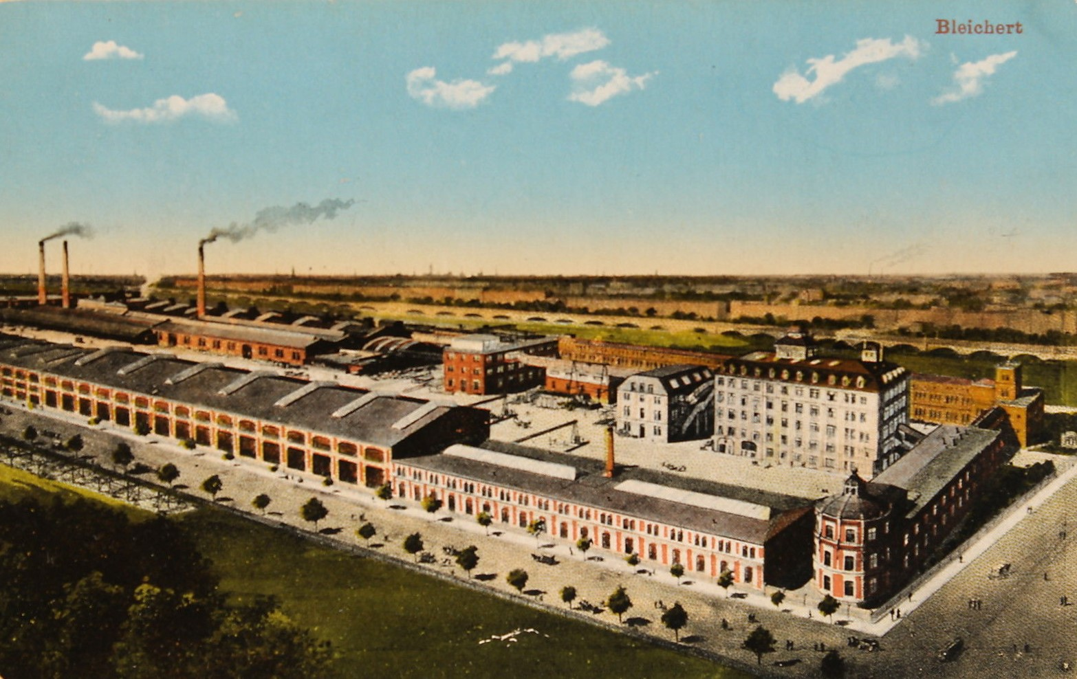 Postkarte aus 1910 mit Fabrikgelände der Bleichert & Co Leipzig-Gohlis, Sachsen, Deutschland